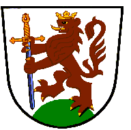 znak obce Šanov